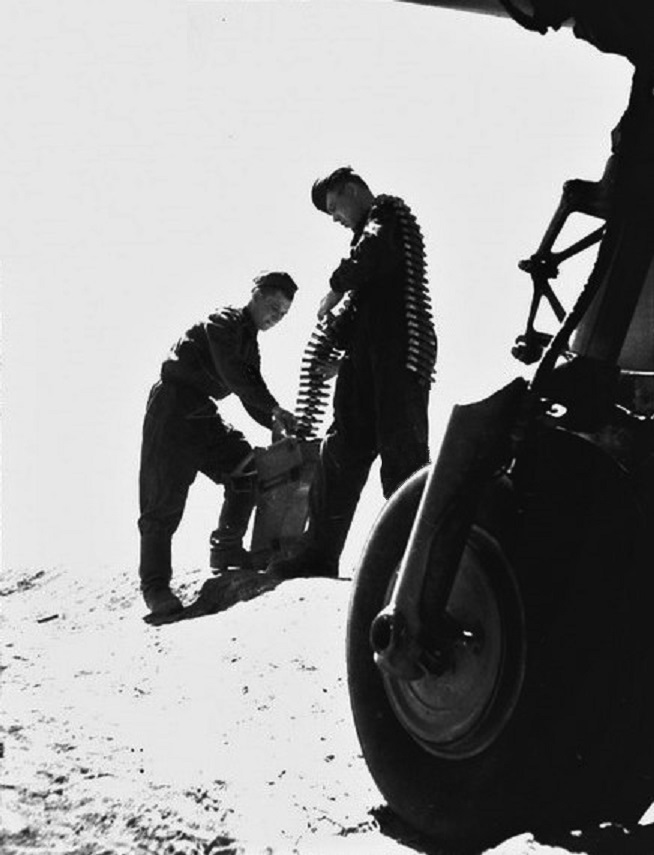 Зарядка боекомплекта. Слева механик по вооружению сержант Шкода Николай Федорович и гвардии сержант Абдулин Камиль Мухамедович